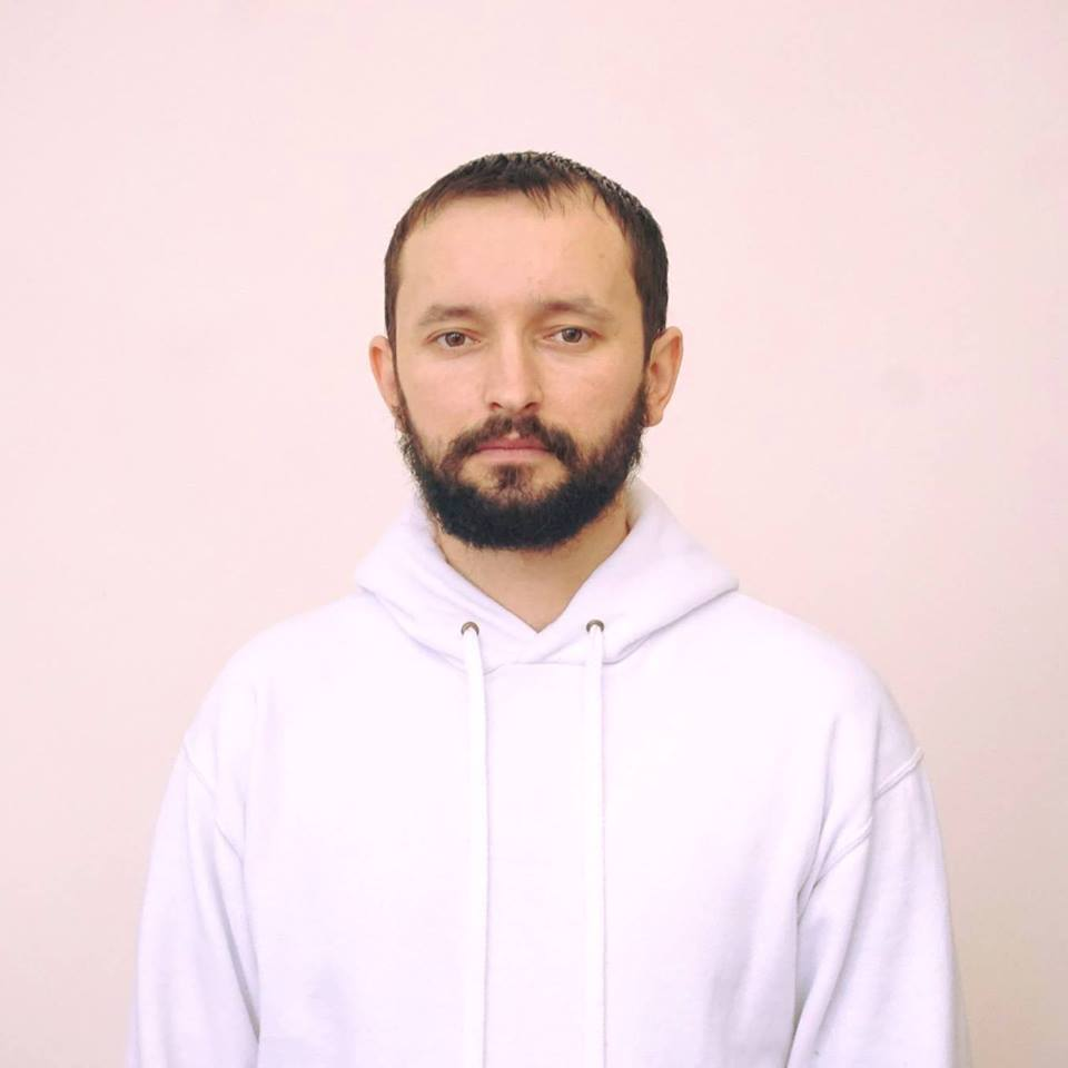 На фото - Поет Олександр Букатюк